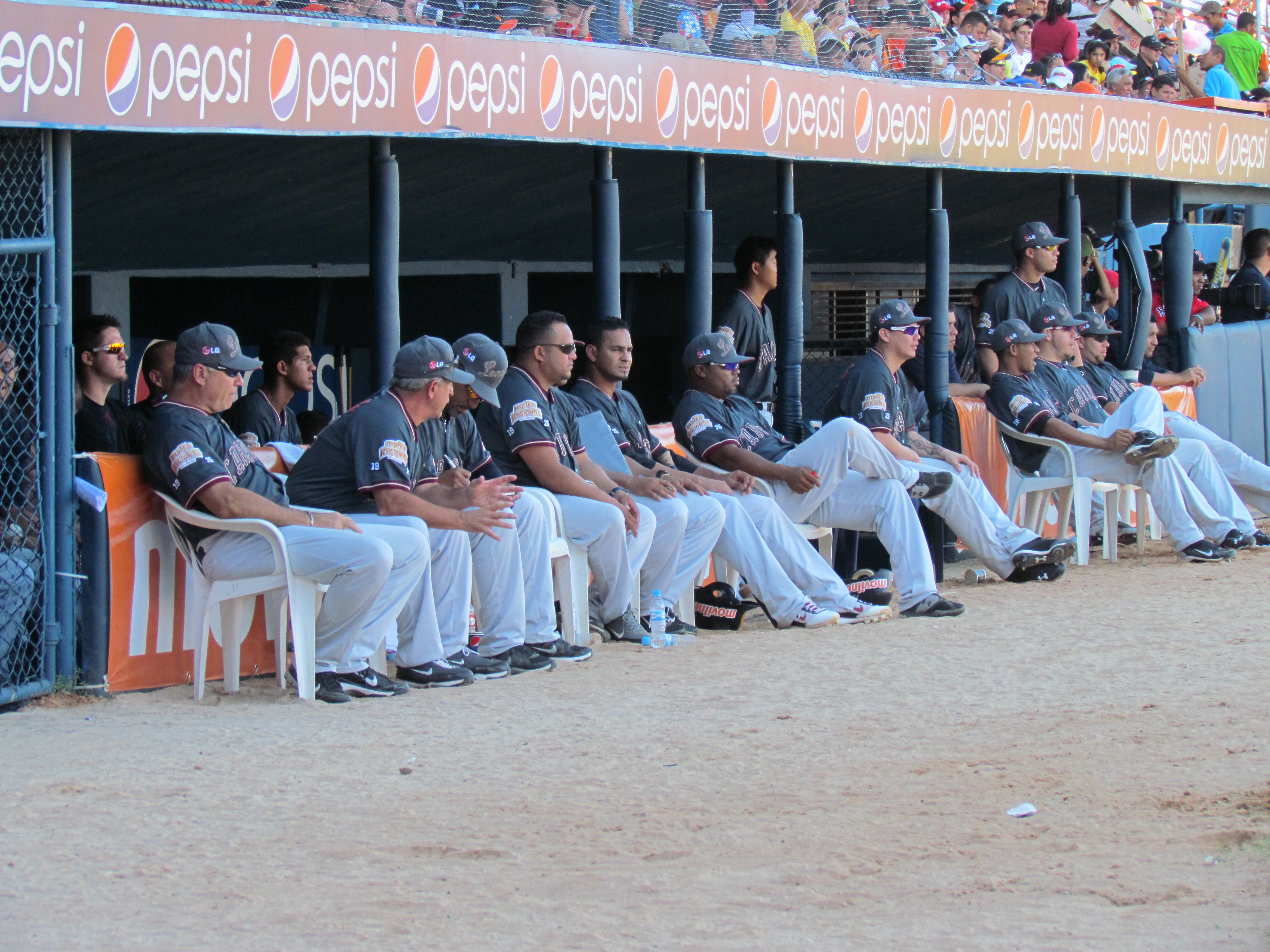 Banca Leones del Caracas - Aguilas del Zulia vs Leones del Caracas 21-12-2011